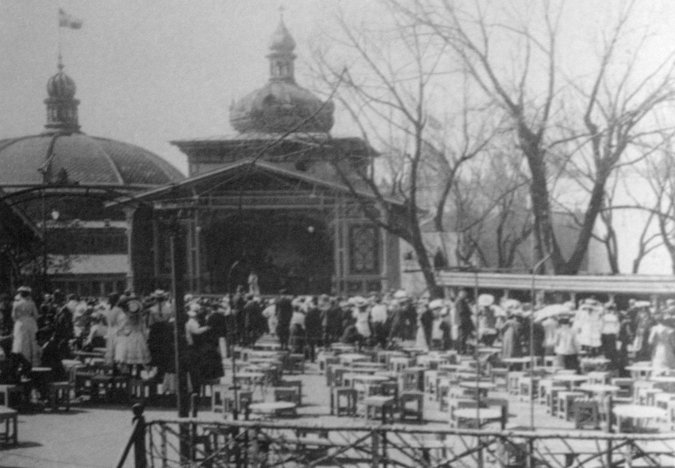 Tivolihaven / Klingenberg